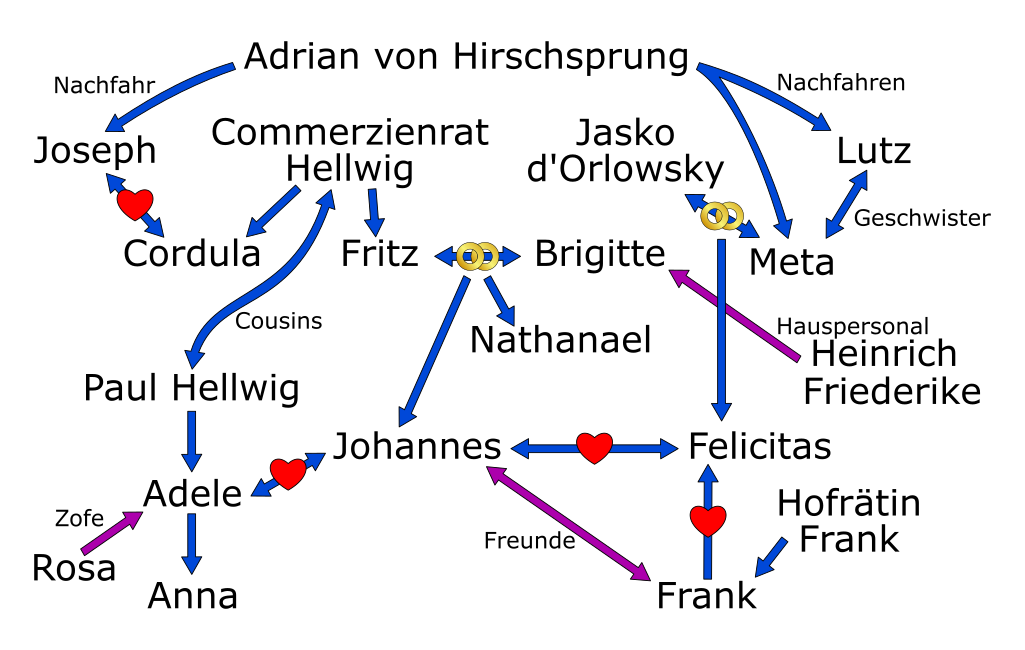 Figurenbeziehungen in E. Marlitts Roman Das Geheimnis der alten Mamsell; blaue Pfeile: Verwandtschafts- oder Liebesbeziehungen, violette Pfeile: sonstige Beziehungen